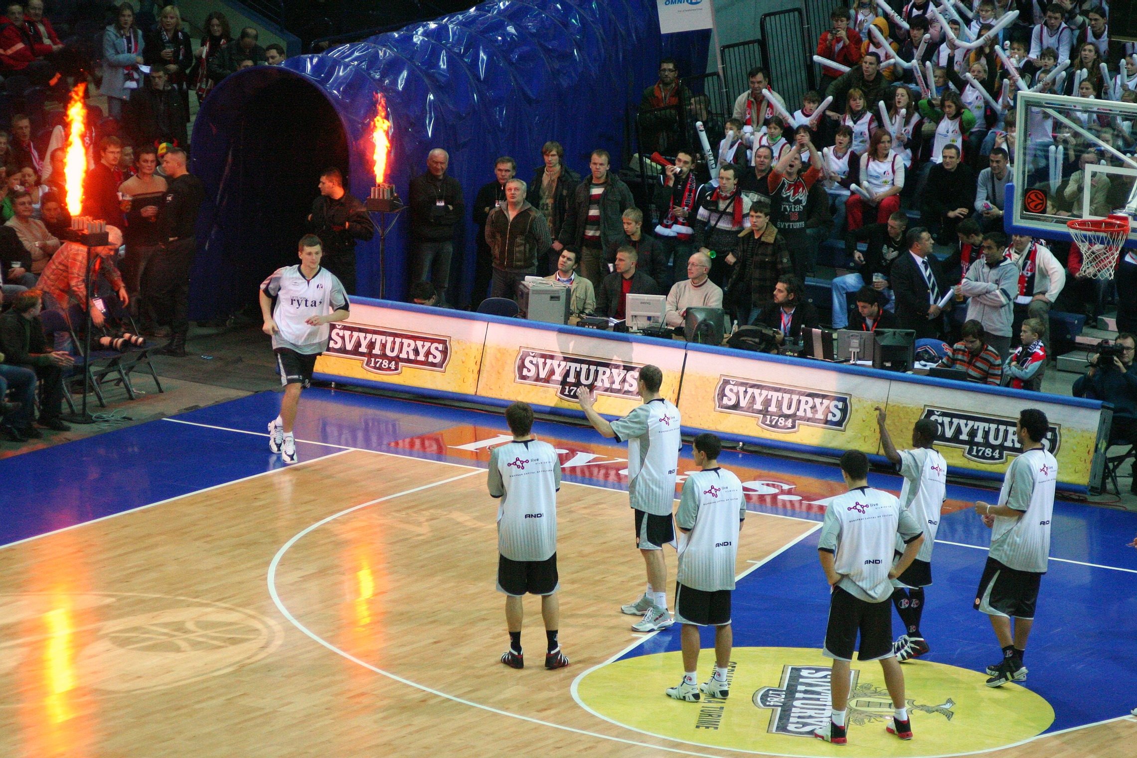 Presenting BC Lietuvos Rytas squad